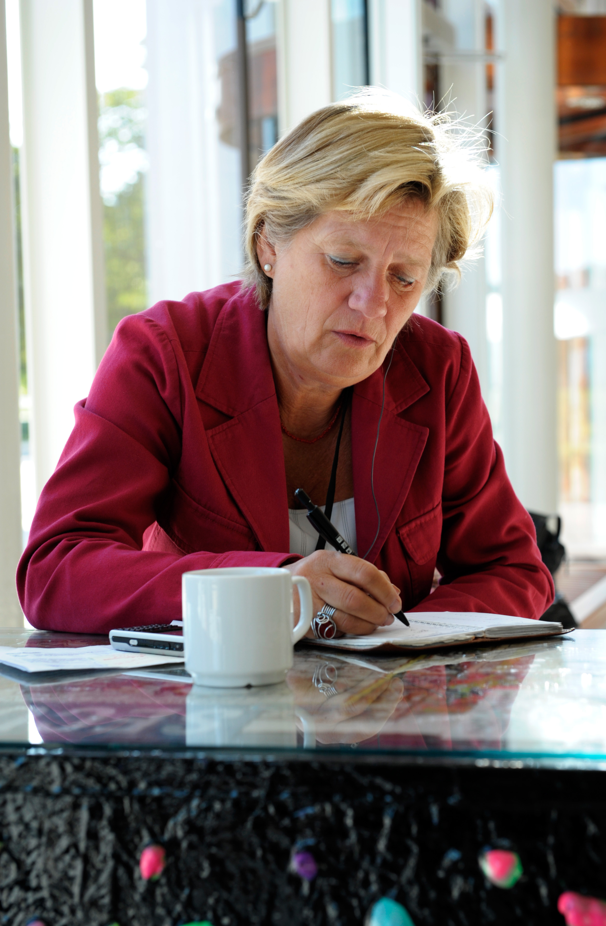 Anita Brodén (fp) deltagare vid BSPC:s möte i Visby 2008-09-01